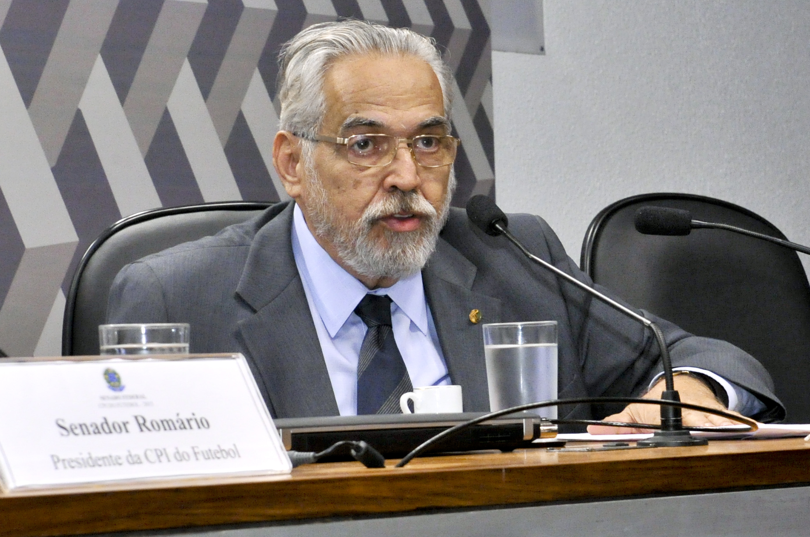 CPI do Futebol – 2015 (CPIDFDQ ) realiza audiência com a participação dos presidentes do Corinthians e do Vasco da Gama. Em pronunciamento, presidente do Clube de Regatas Vasco da Gama, Eurico Miranda. Foto: Waldemir Barreto/Agência Senado